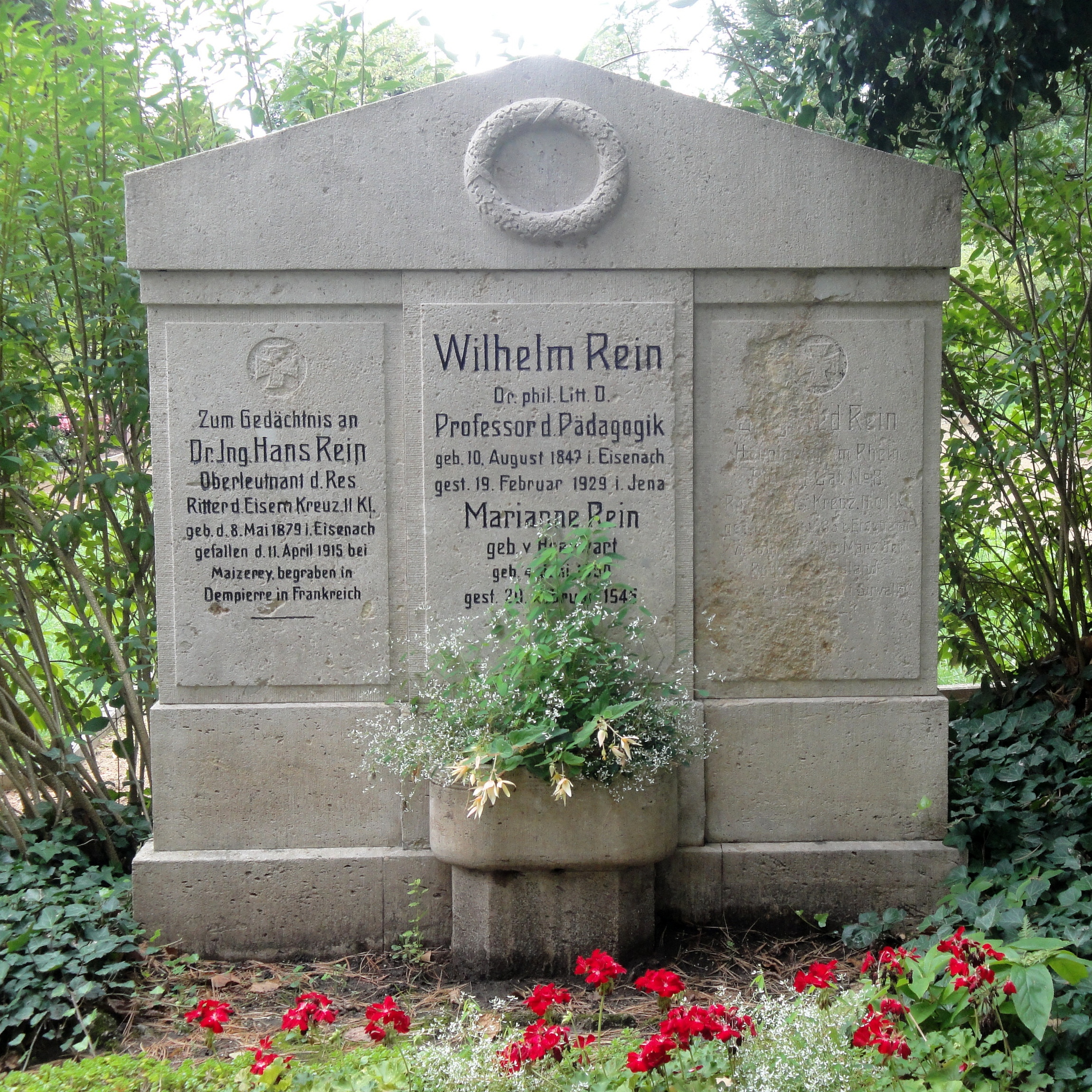 Grab von Wilhelm Rein auf dem Nordfriedhof in Jena